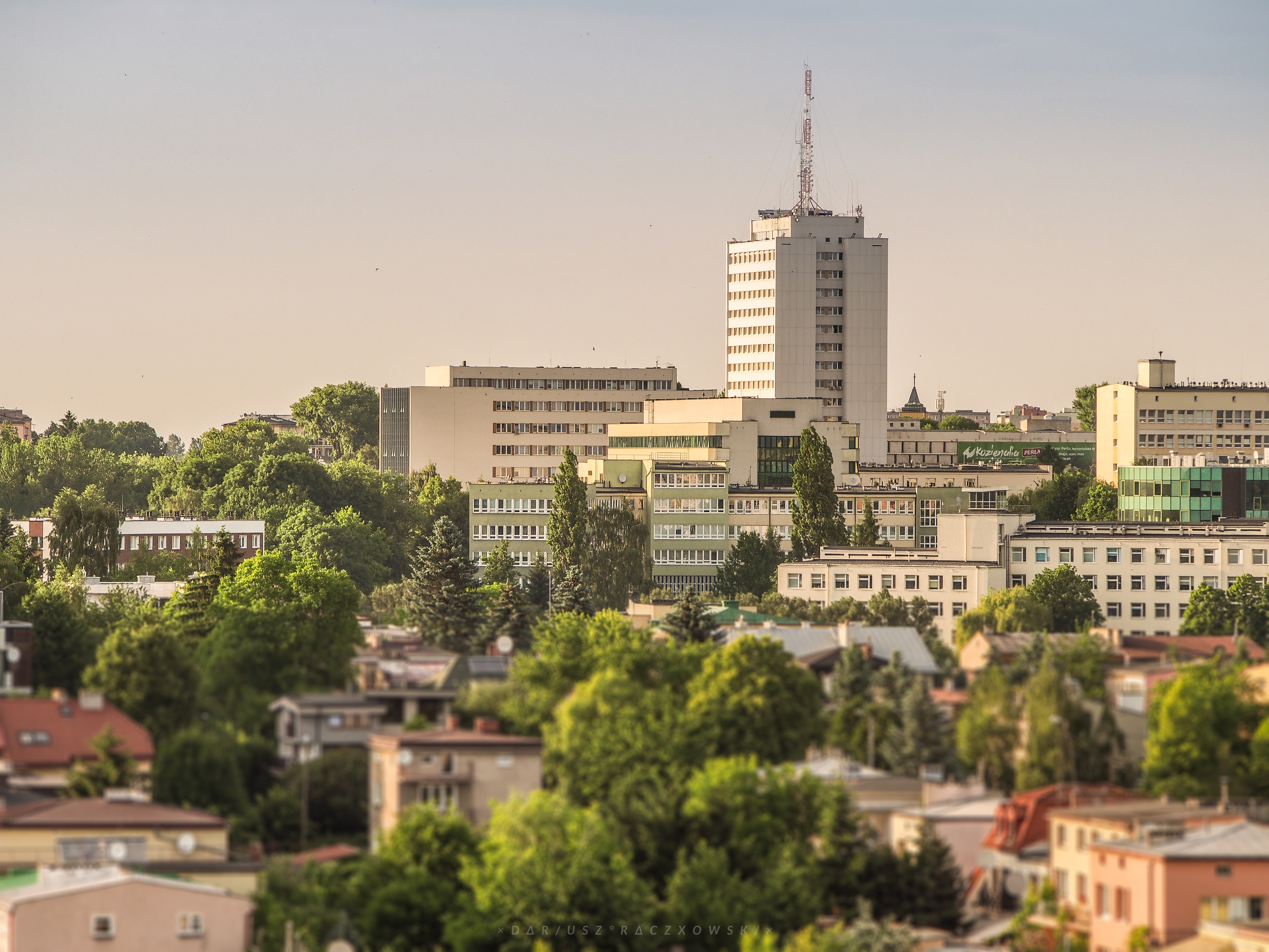 Lublin - widok z LSM na rektorat